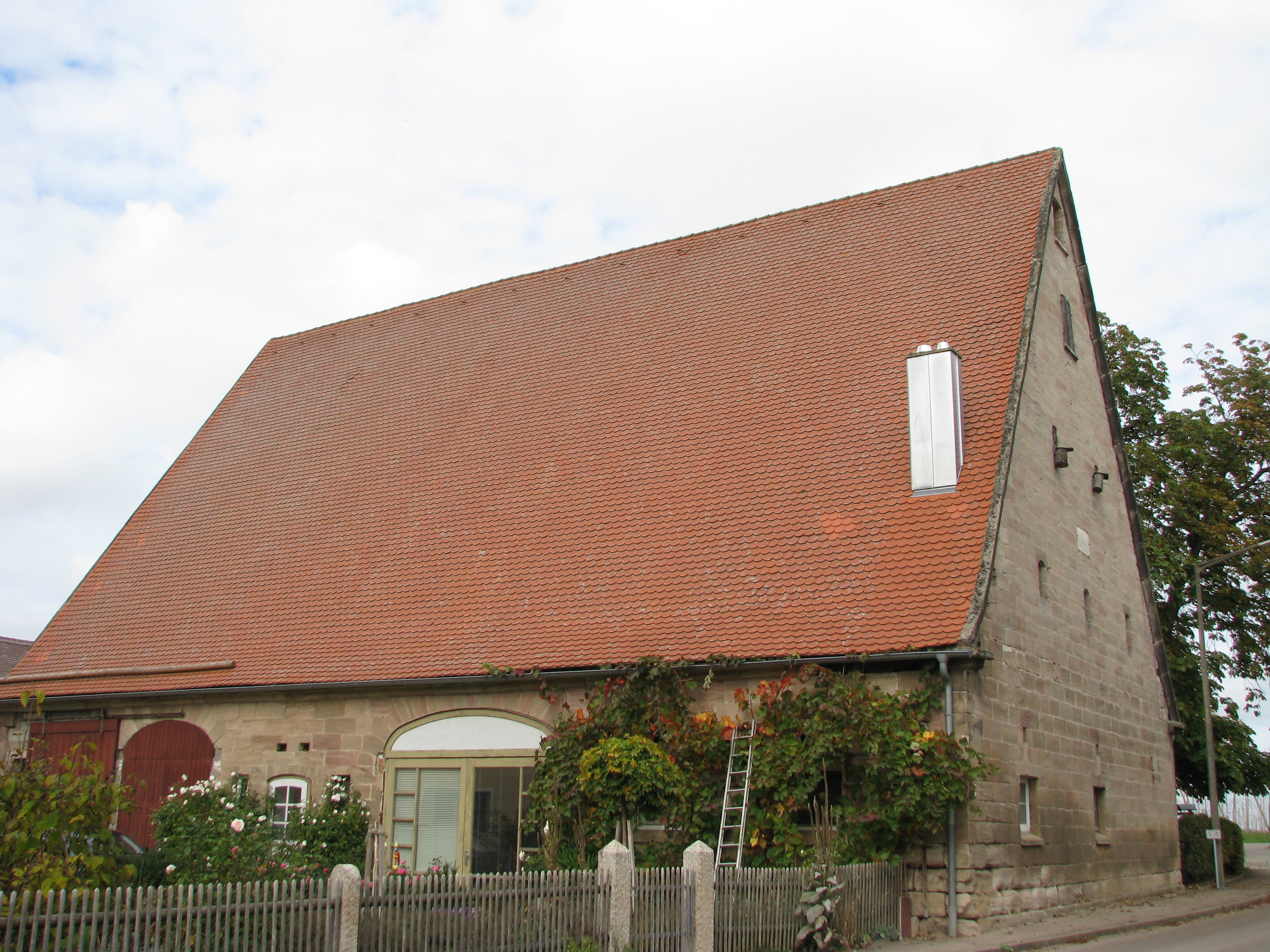 Rudletzholz, Gemeindeteil von Heideck im mittelfränkischen Landkreis Roth, Sandstein-Stadel von 1857